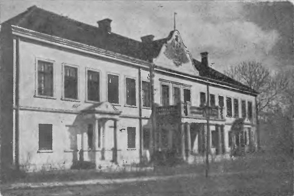 Budynek 51 Pułku Piechoty Strzelców Kresowych w Brzeżanach